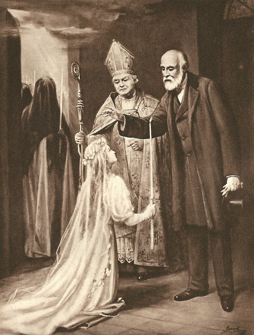 Gravure de Sainte Thérèse de l'Enfant Jésus, Histoire d'une âme écrite par elle-même, Lisieux, Office central de Lisieux (Calvados), & Bar-le-Duc, Imprimerie Saint-Paul, 1937, édition 1940. « Thérèse demande la bénédiction de son père le jour de sa prise d'habit, le 10 janvier 1889 ».